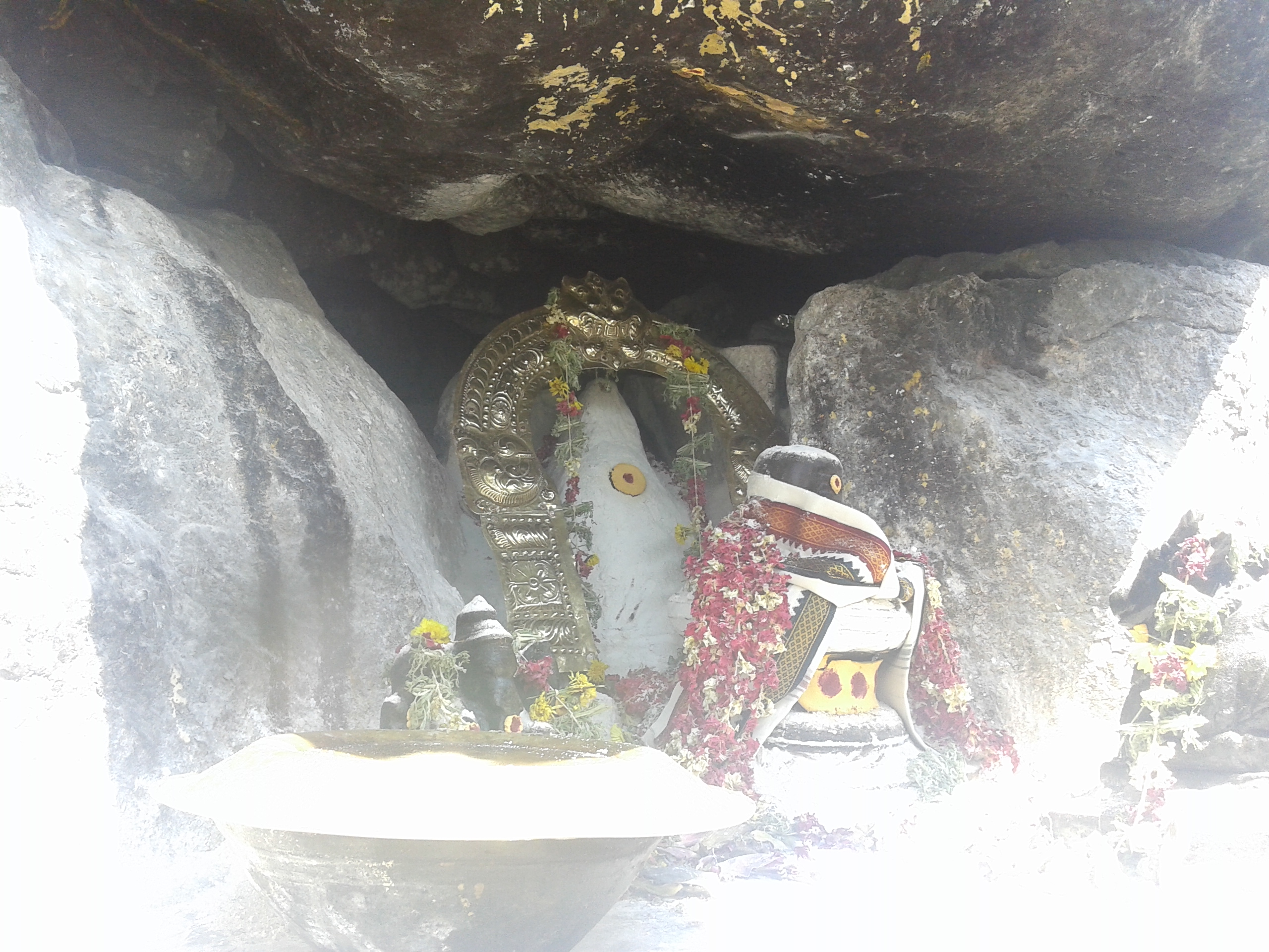 பகவான் ராம தேவர் சித்தர்